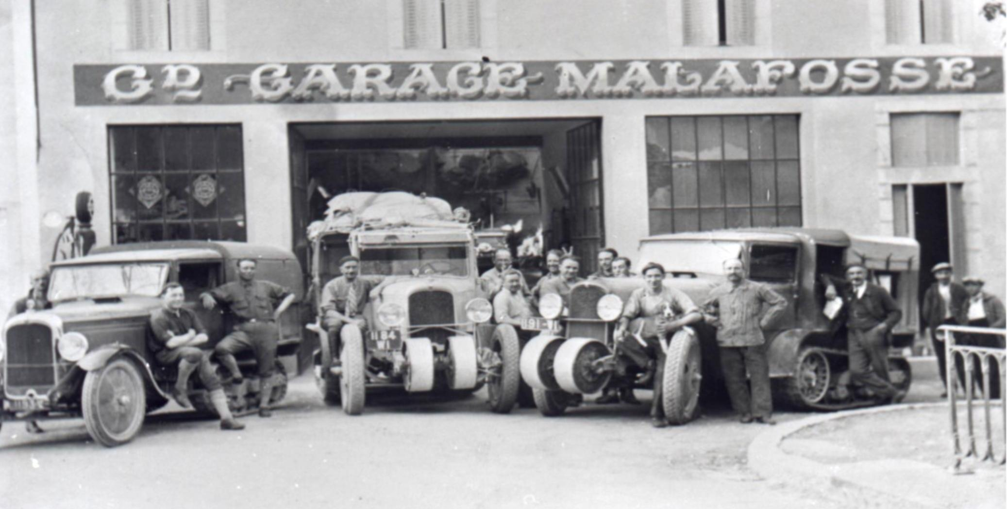 Croisière Jaune. Essais des véhicules pendant les hivers 1929 - 1930 dans le Causse Méjean qui ressemble au désert de Gobi. Photographie prise dans le village de Meyruis, près du causse.